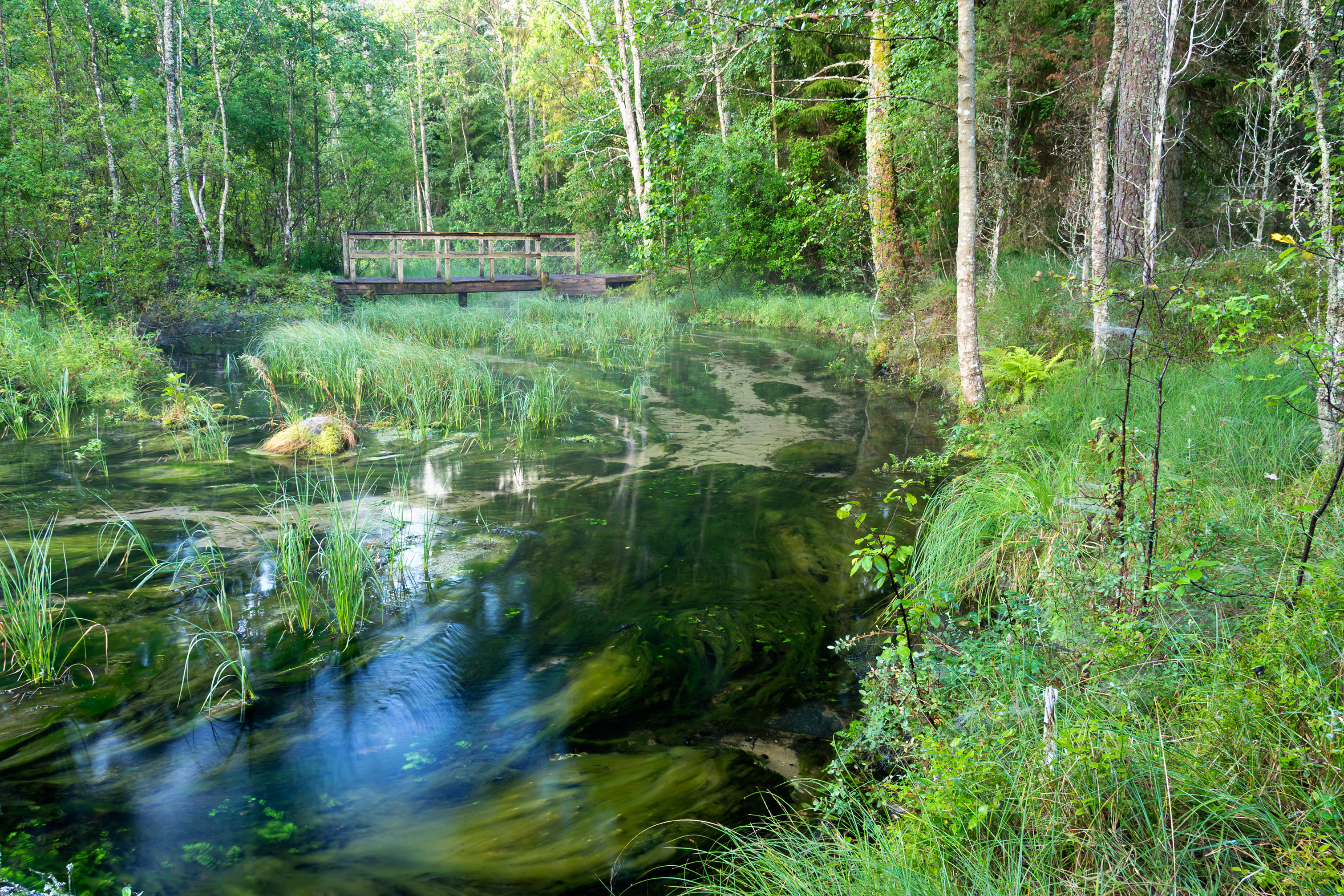 Pidula veskioja Odalätsi allikate juures